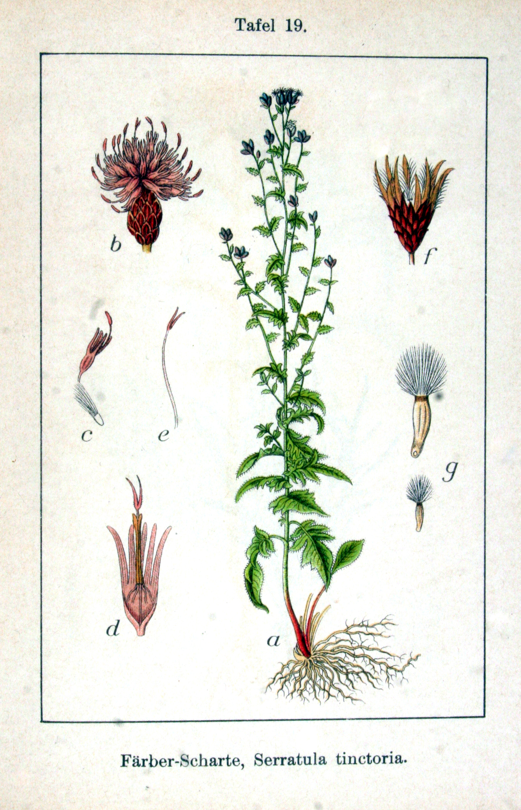 Serratula tinctoria - en Krause, E.H.L., Sturm, J., Lutz, K.G., Flora von Deutschland in Abbildungen nach der Natur, Zweite auflage, vol. 14: t. 19, 1906.